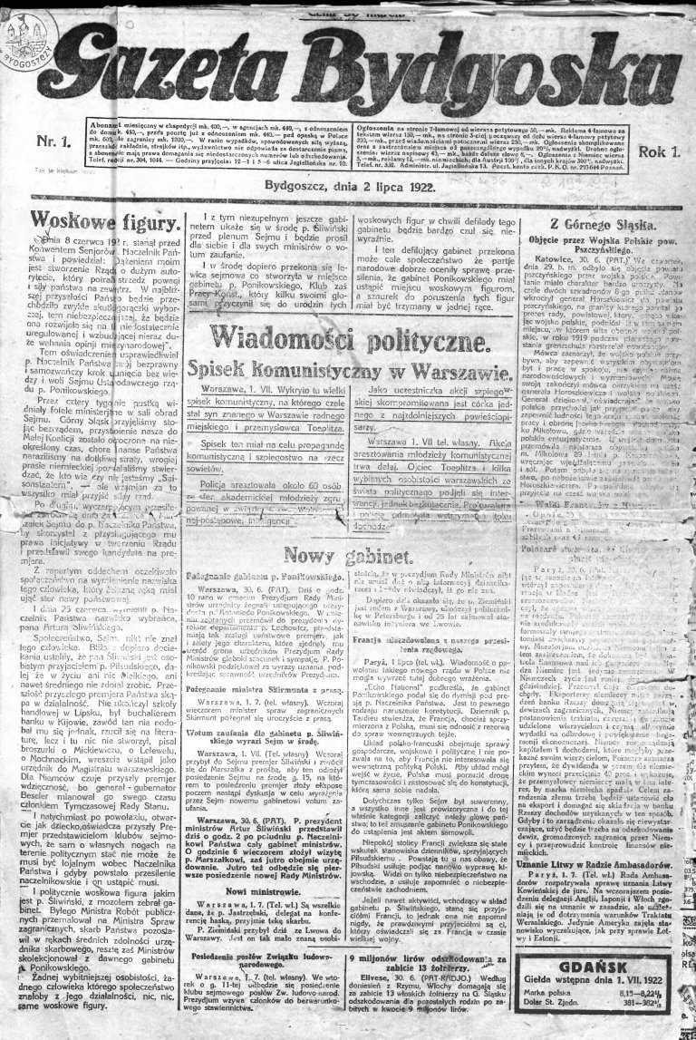 Pierwszy numer Gazety Bydgoskiej, 2 lipca 1922 r.